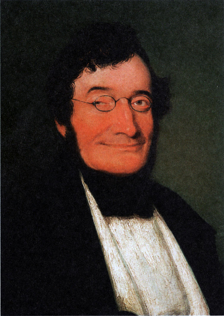 Nikolaus Johann van Beethoven (1776-1848) im Alter von 65 Jahren. Der jüngere Bruder Ludwig van Beethovens war Apotheker und Hausbesitzer in Linz